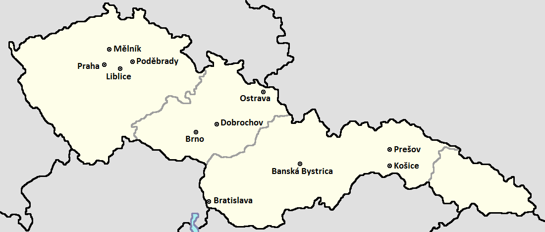 Senderstandorte des Tschechoslowakischen Rundfunks (1930er-Jahre)